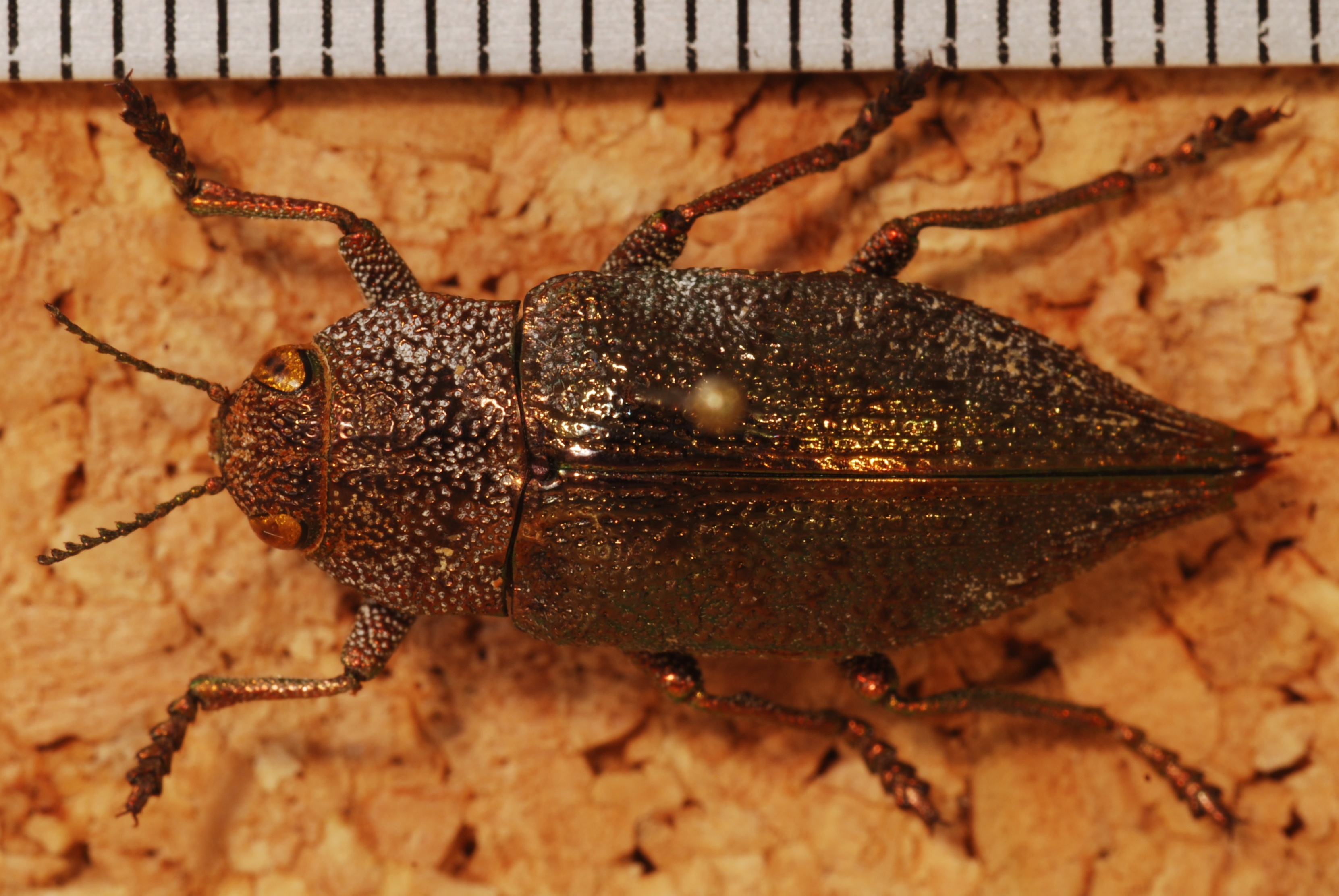 Les Angles, Gard, FRANCE